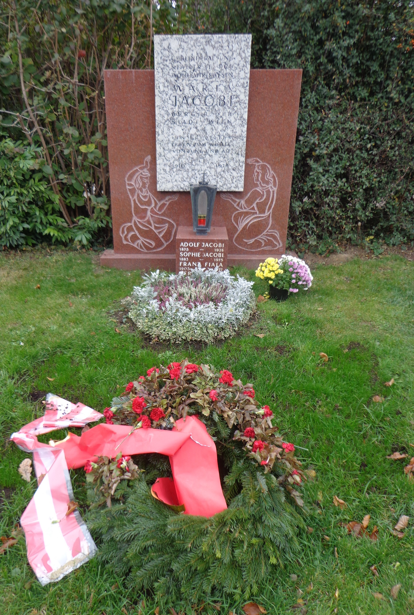 Wiener Zentralfriedhof - Gruppe 14 C, Ehrengrab von Maria Jacobi (1910–1976)